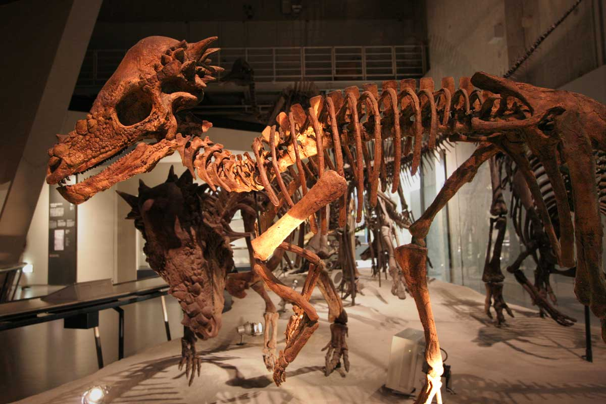 Pachycephalosaurus - 01